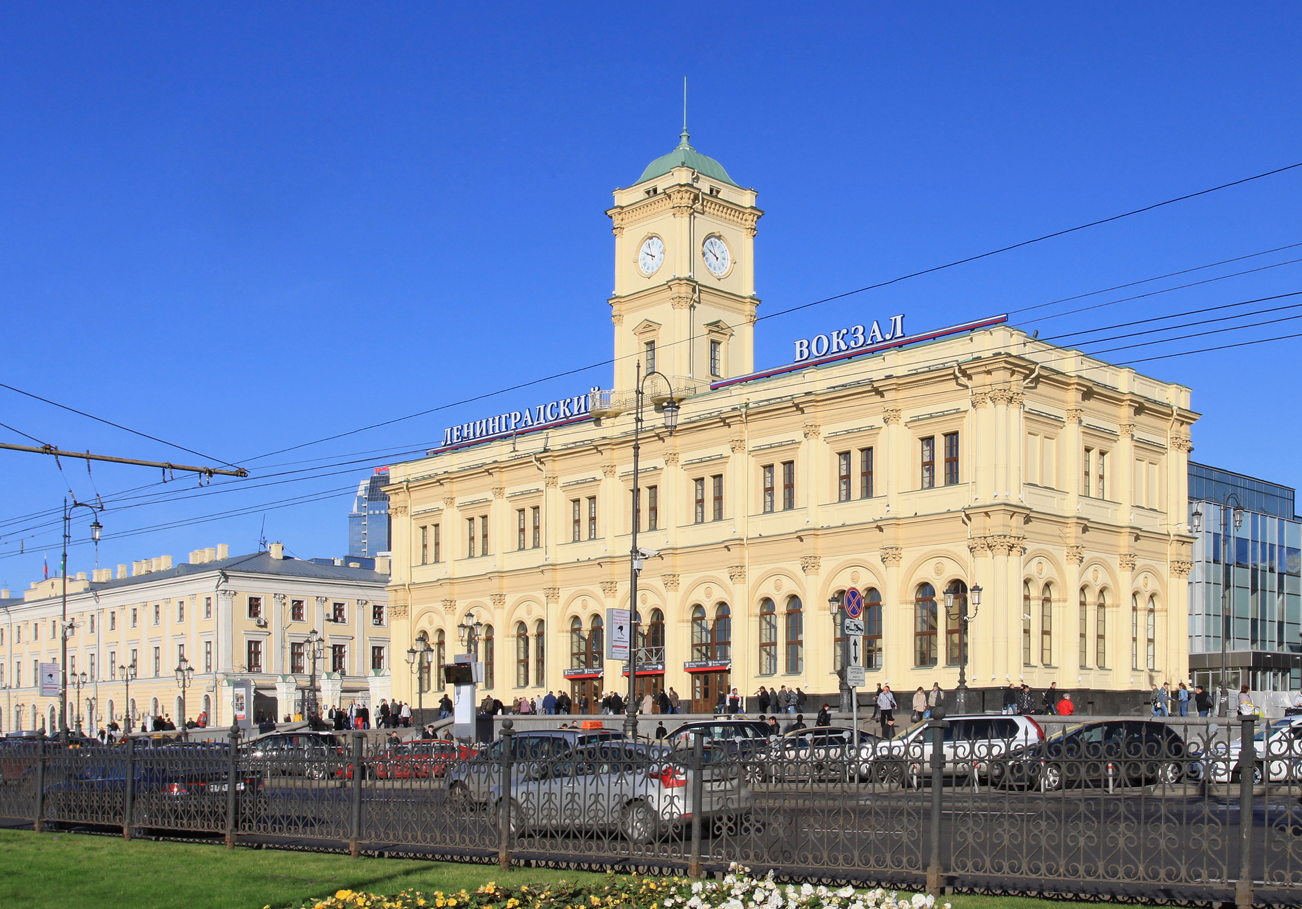 Вокзал Николаевский (Ленинградский) (Москва и Московская область, Москва, Комсомольская площадь, 1-а, 3)